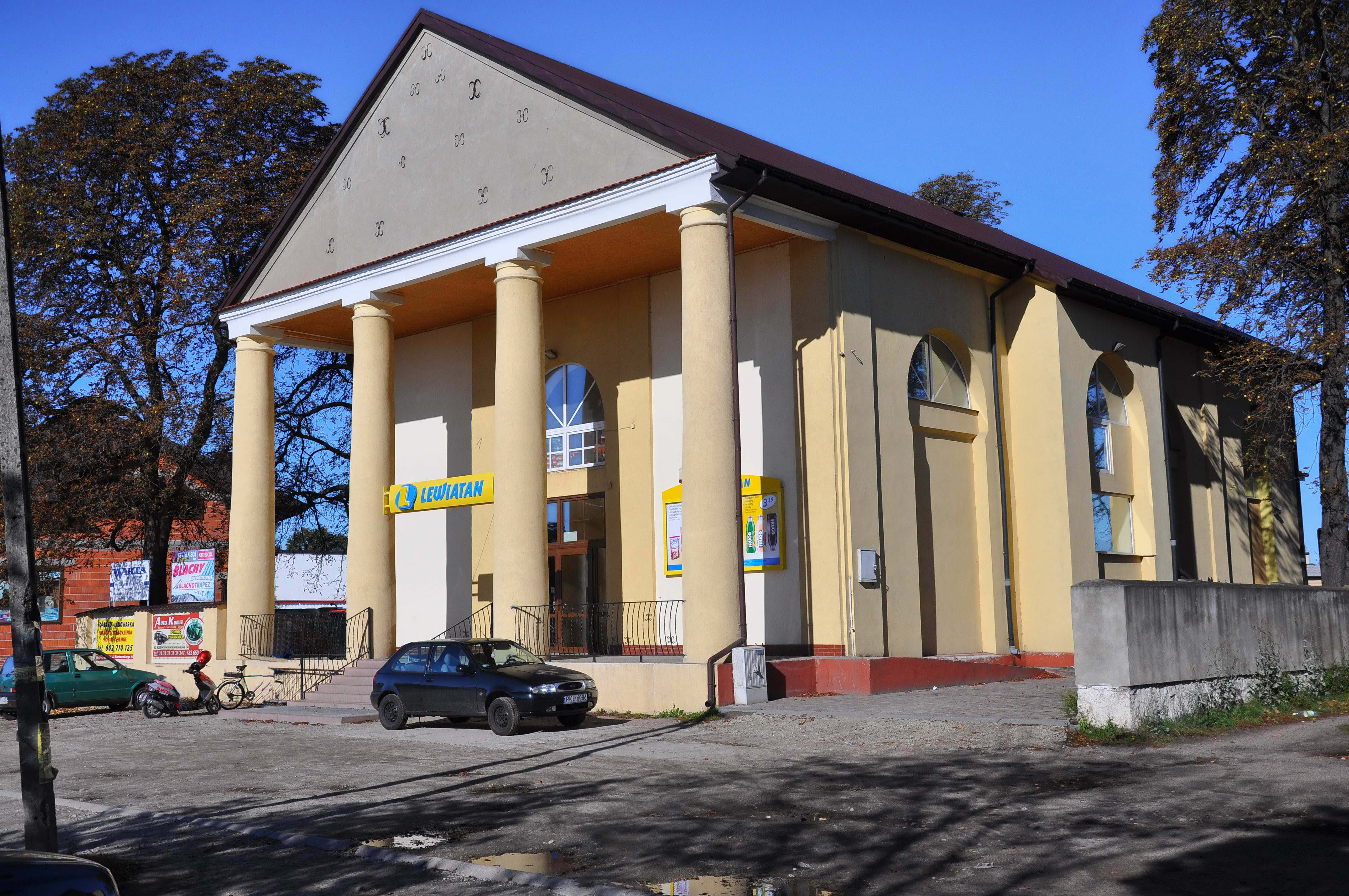 dawny kościół ewangelicki z 1823 r. Babiak, pl. Wolności 16, Gmina Babiak